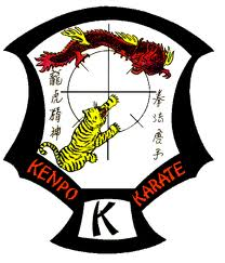 escudo de la i.k.k.a. inventado por dick tercell y su hermano david.